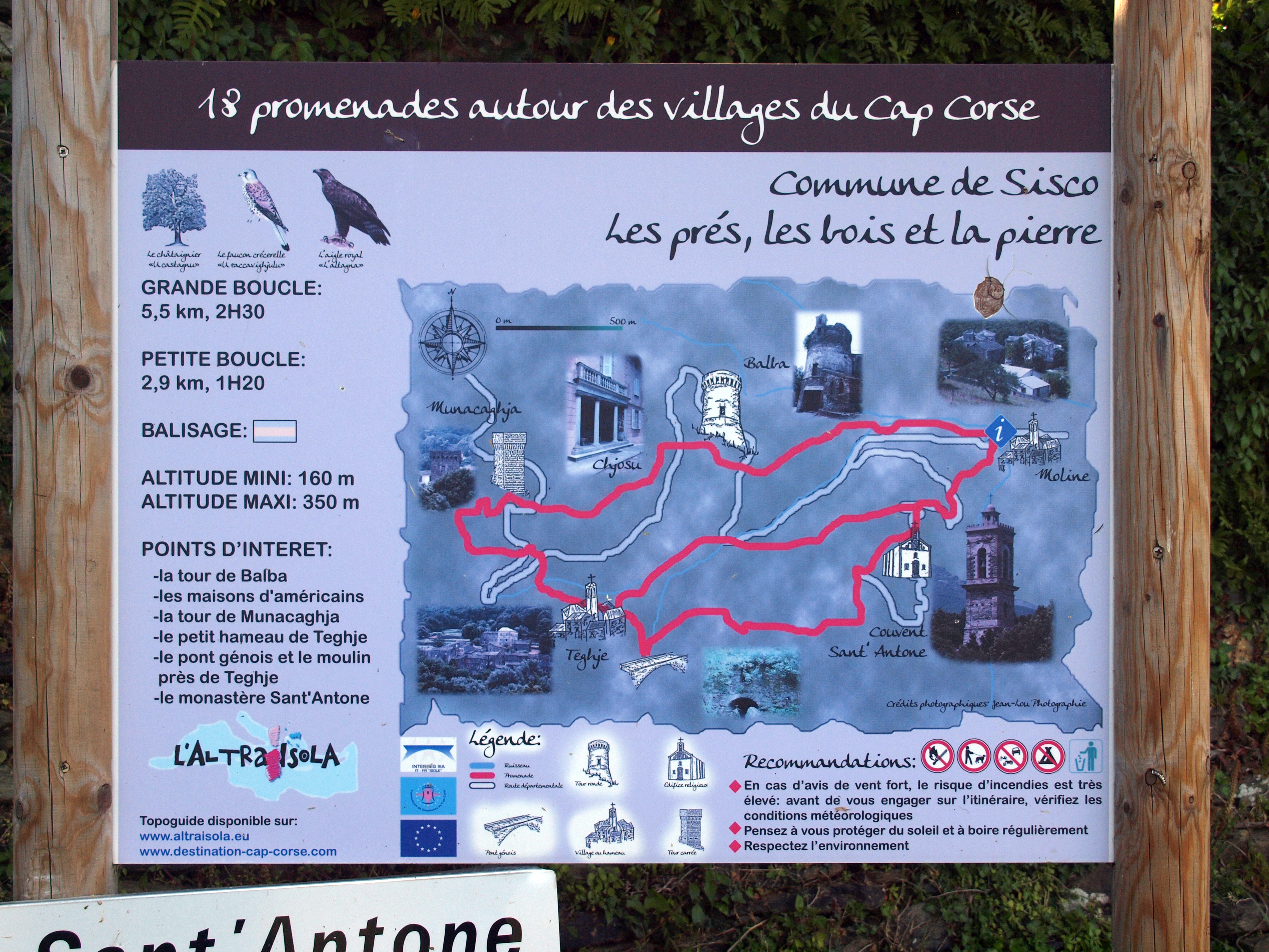 Sisco, Cap Corse (Corse) - Panneau de promenade patrimoniale "les prés, les bois et la pierre"